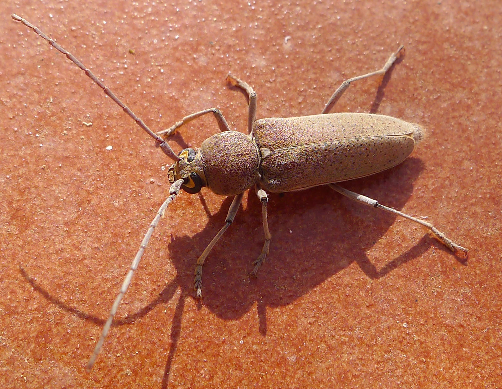 Cerambycidae. Hesperophanes sericeus.